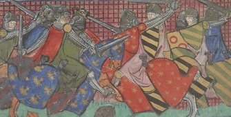 Bataille du Confluent, entre le roi arverne Bituit et les troupes romaines. Miniature issu du Speculum historiale de Vincentius Bellovacensis.